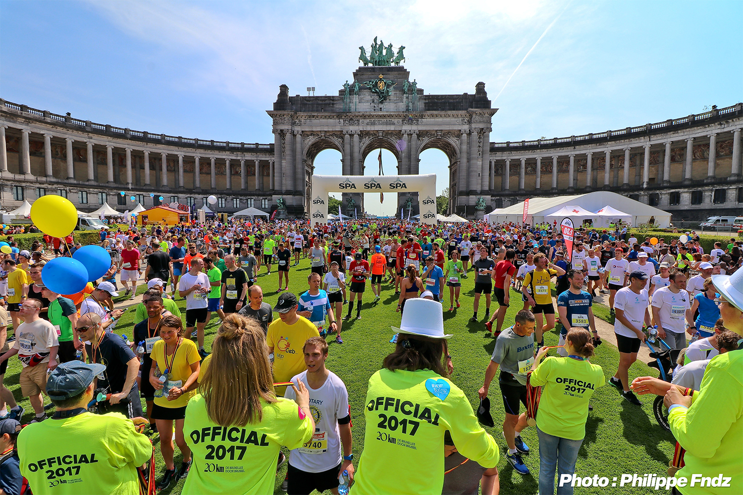 Remise des médailles après la ligne d'arrivée